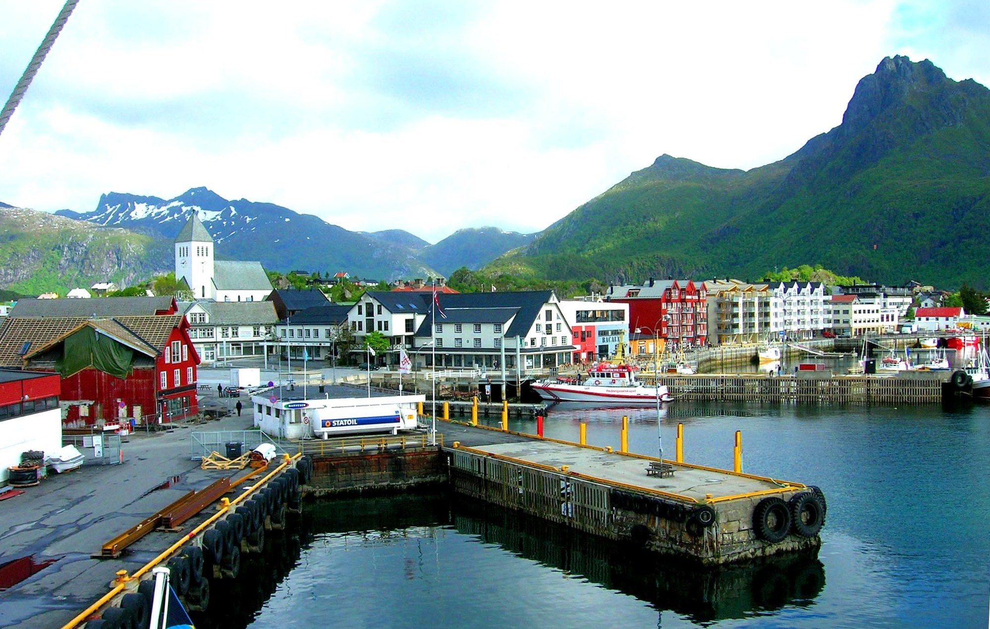 Den Fährhafen vu Svolvaer